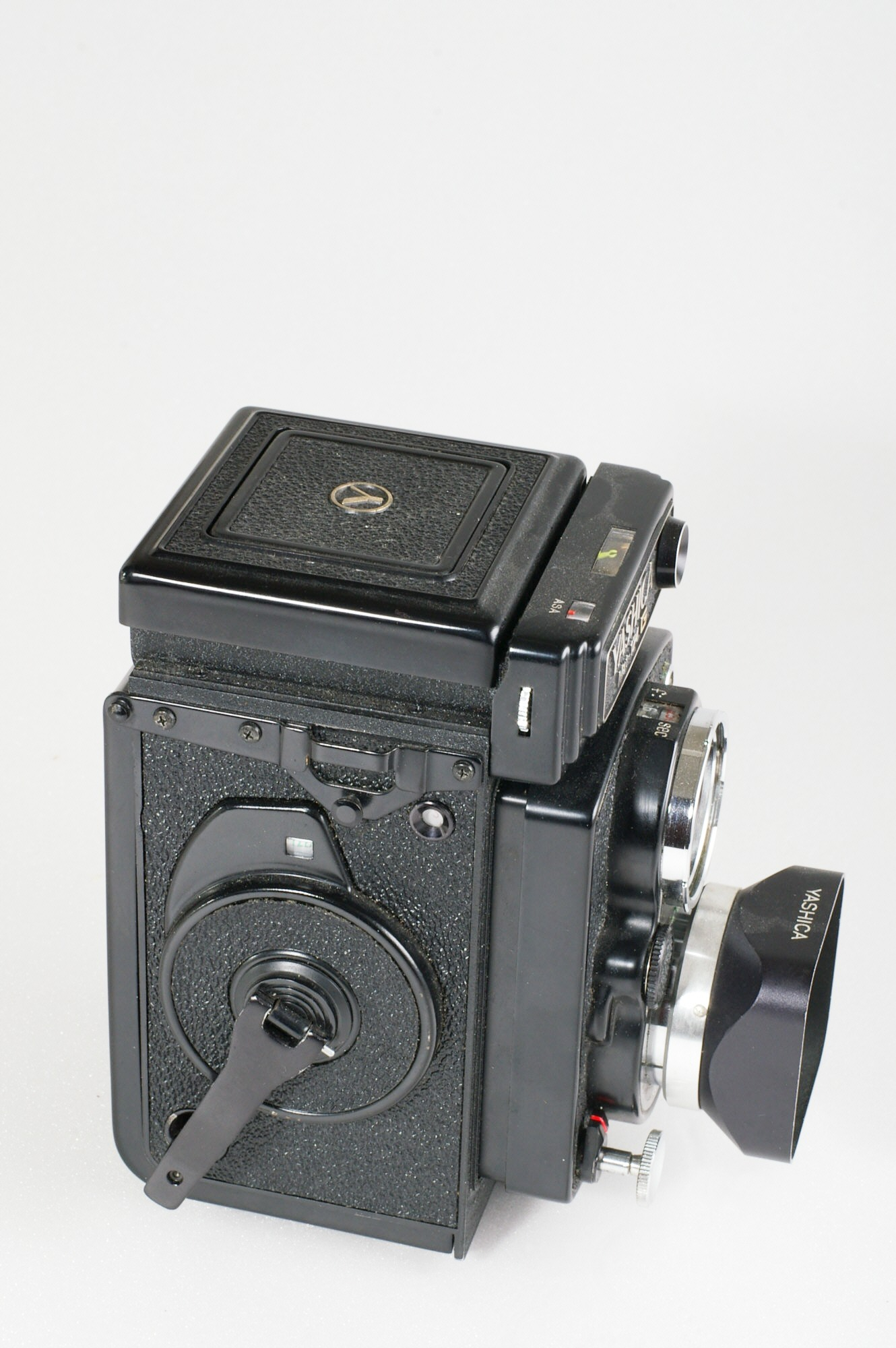 Yashica Mat 124 G mit geschlossenem Faltlichtschachtsucher